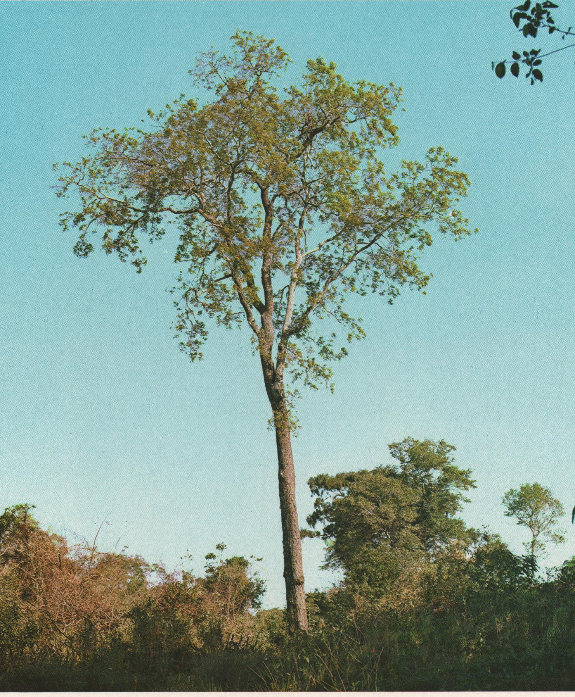 Ejemplar de Astronium balansae en Argentina.